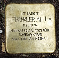 Botlatókő (stolperstein) Petschauer Attila emlékére, egykori lakhelye bejárata előtt. (1012 Budapest, I. ker. Attila út 65.)